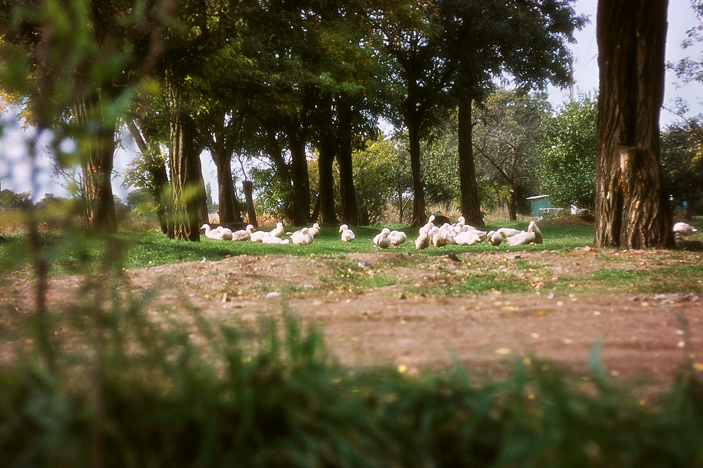 Зерноград Ростовской области. Новый поселок